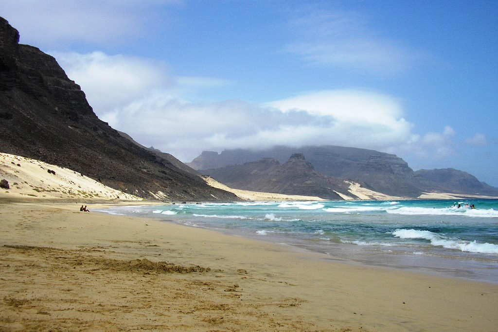 "Praia Grande do Calhau" beach at São Vicente island, Cape Verde